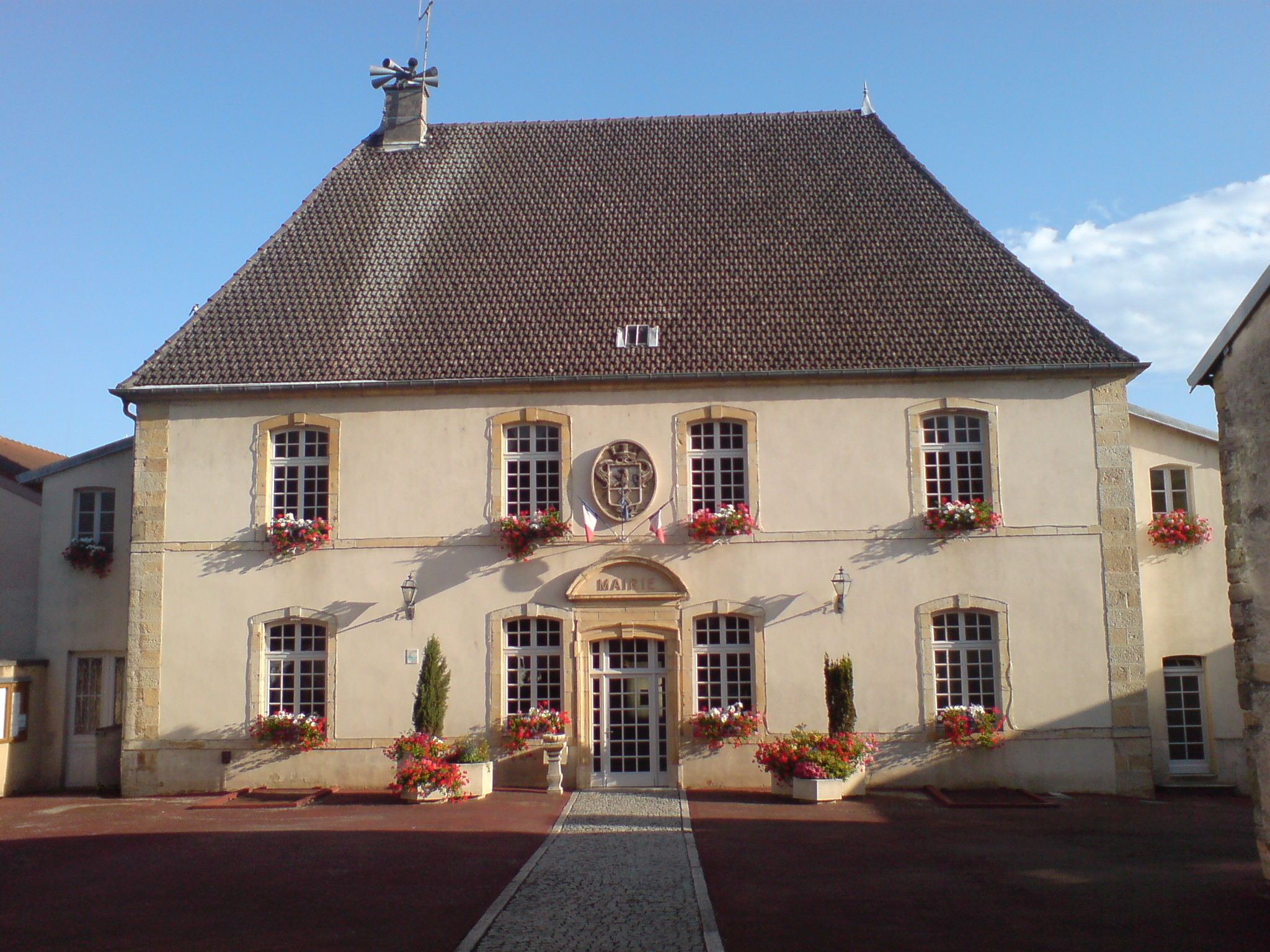 Mairie de Jussey